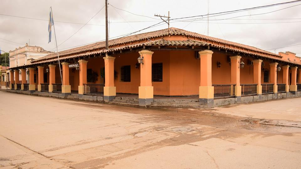 Antigua Municipalidad de Oran